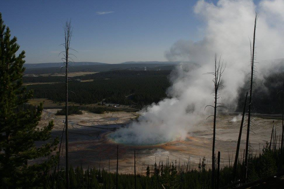 Izvor vruće vode